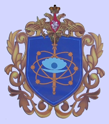 Эмблема 40-го Отдельного командного измерительного комплекса. Витино, Республика Крым